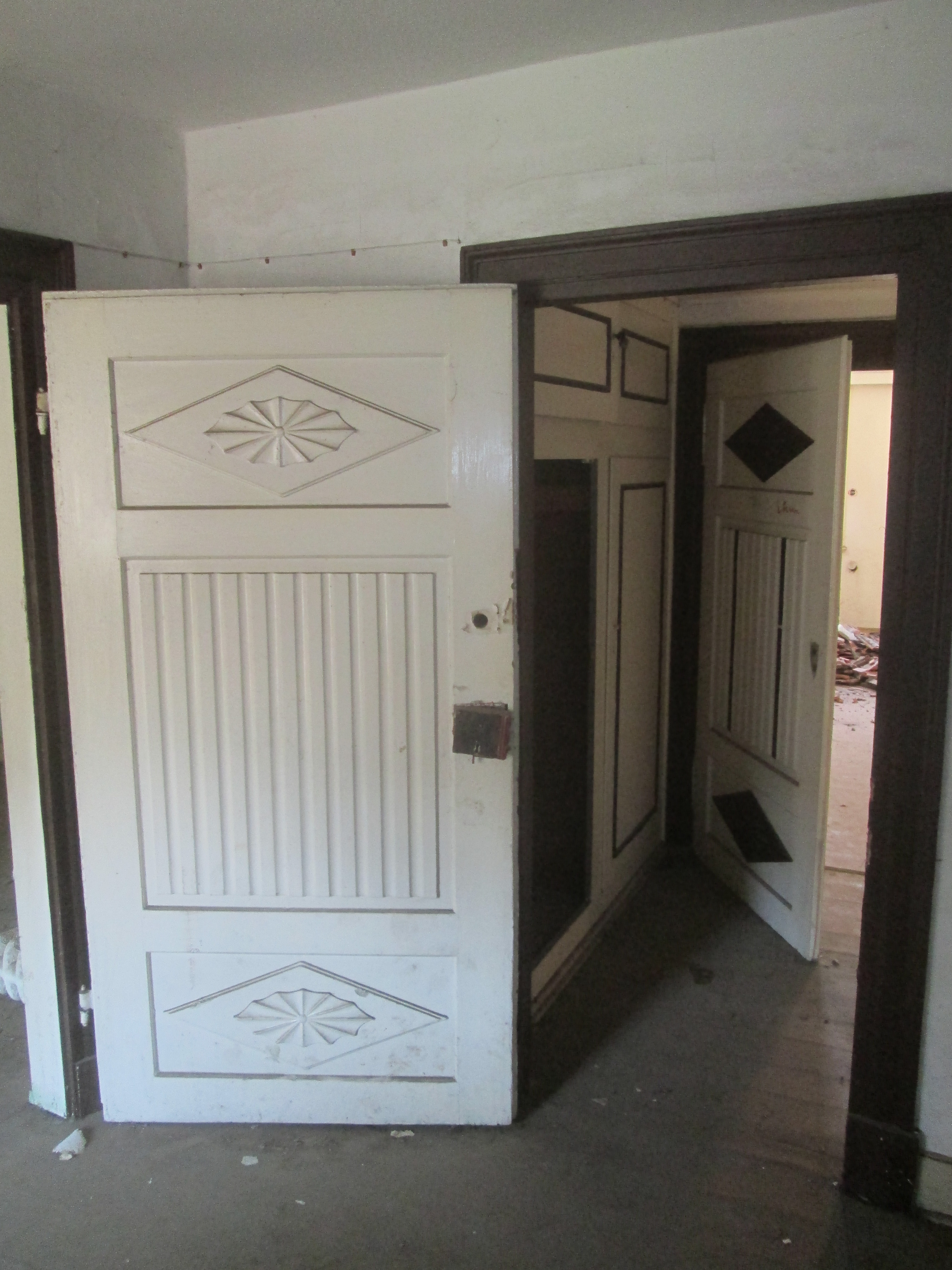 Gotha, Brühl 9-11 beim Abbruch